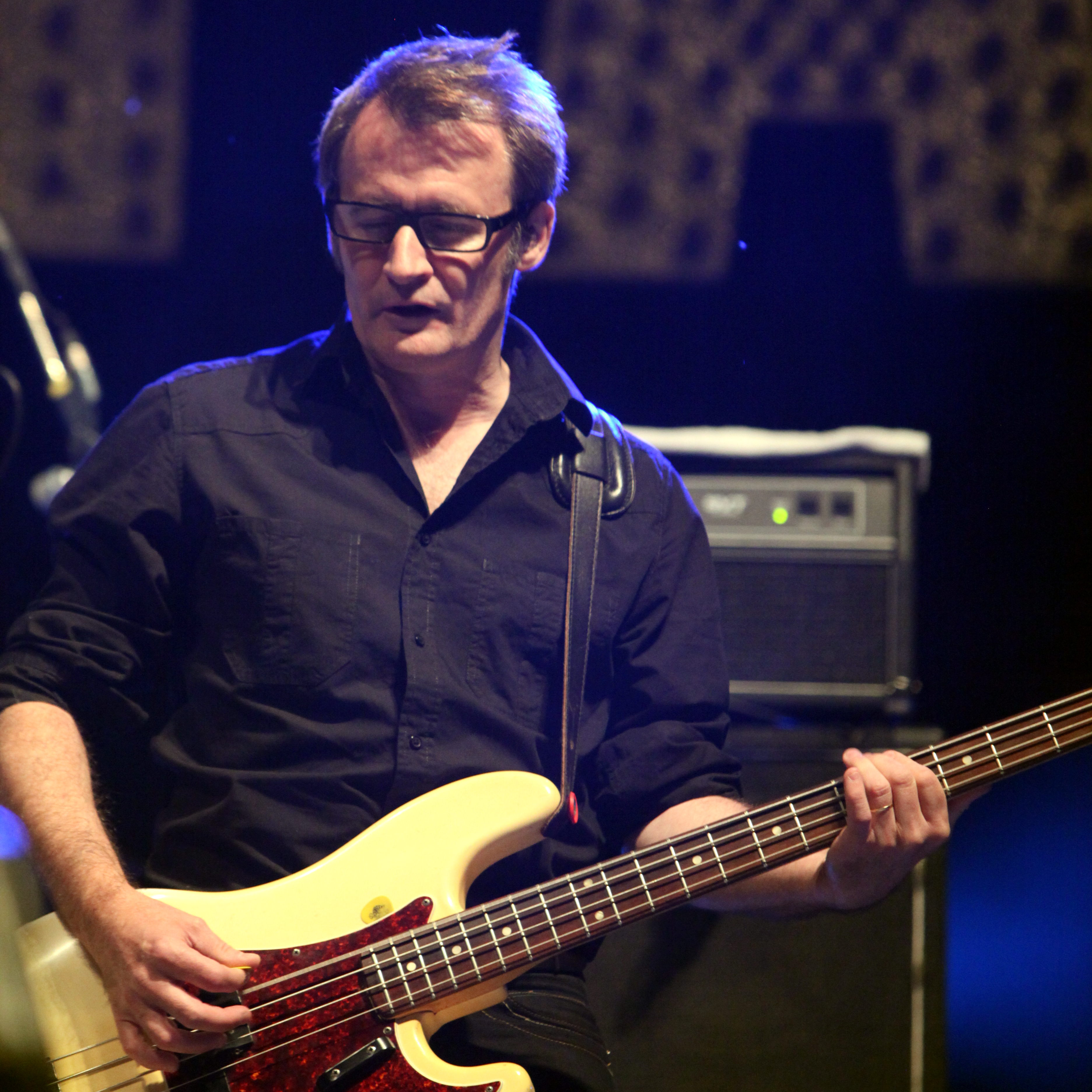 Jean-Michel Lejoux (Les Wampas) at Balelec 2011